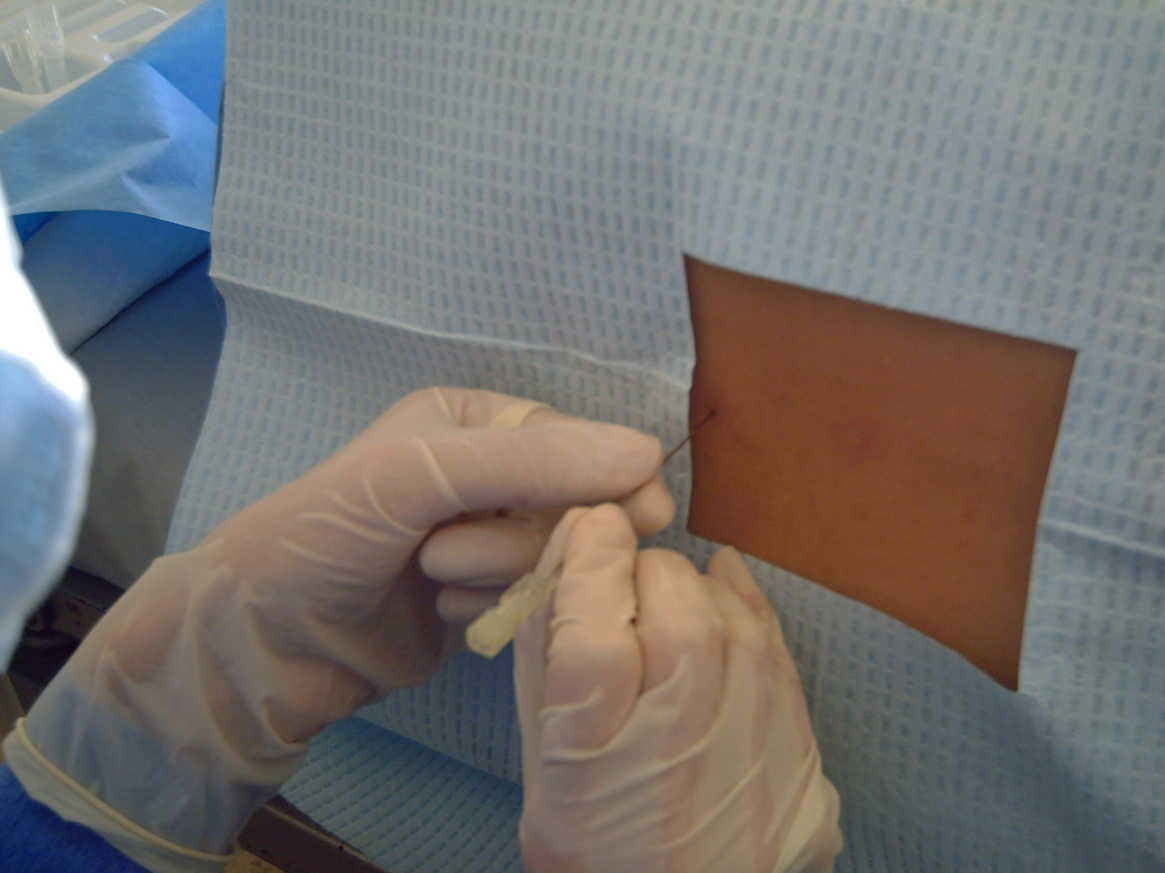 Médico realizando procedimiento de punción lumbar en un paciente en decúbito lateral derecho con hiperflexión de la columna lumbar